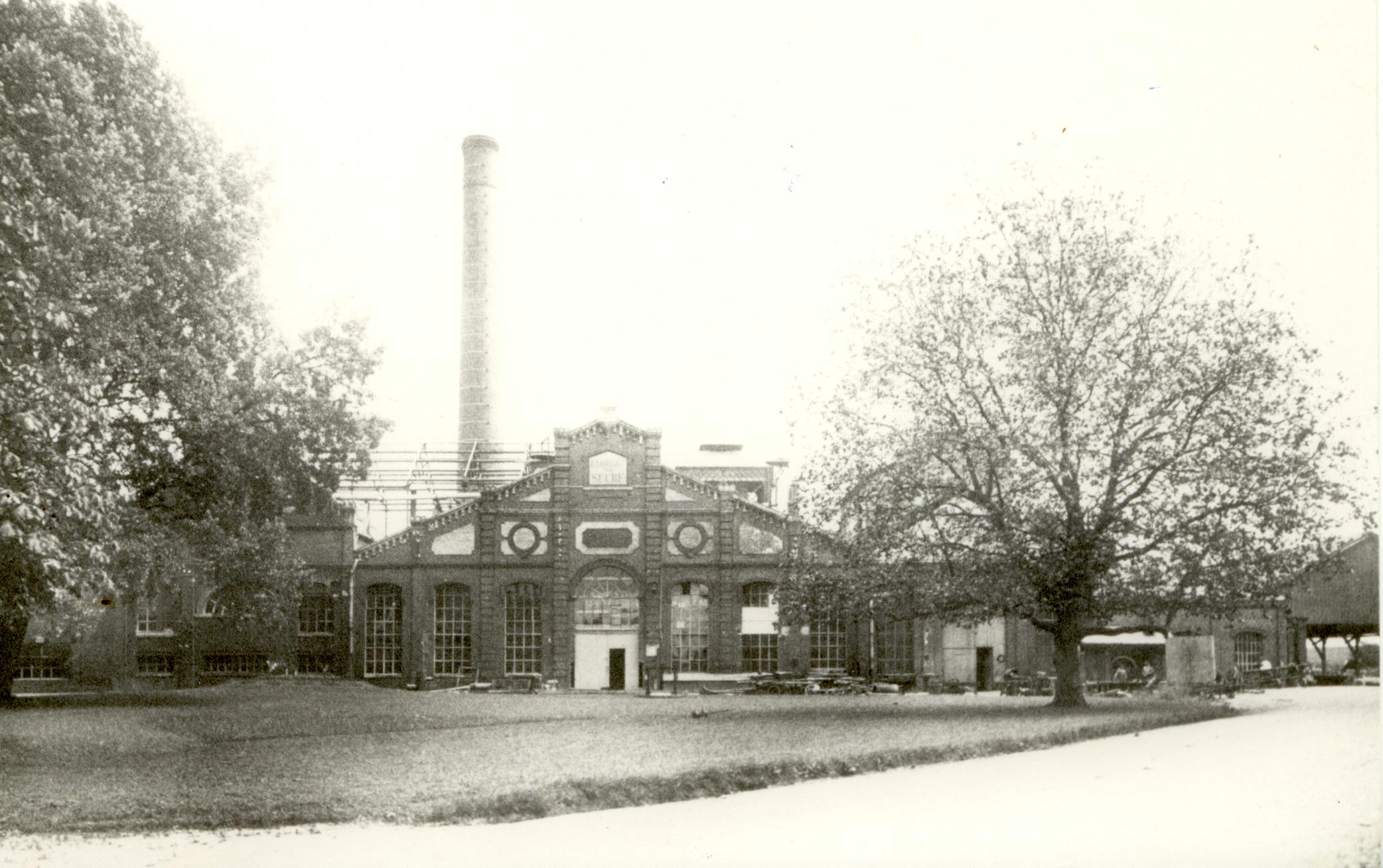 photo de la façade de la sucrerie d'Etrépagny avec la cheminée en brique.